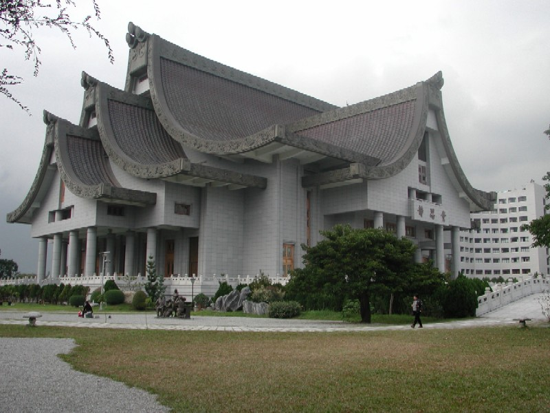 花蓮市慈濟基金會本部靜思堂